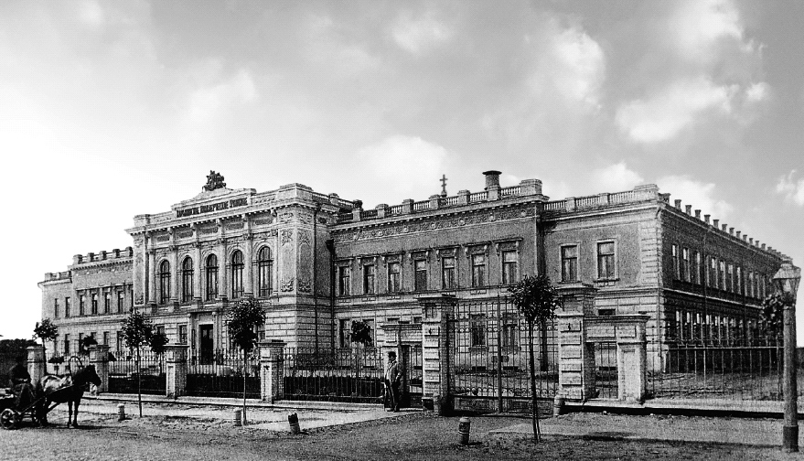 Здание Харьковского коммерческого училища Императора Александра III, 1893 Открытое письмо Российской Империи самого конца XIX века. Харьков, ул. Пушкинская, 77. Академик архитектуры Алексей Бекетов. Стиль неоренессанс. В советское время Харьковский юридический институт сначала имени Кагановича, затем имени Ф.Э. Дзержинского (ХЮрИ). Сейчас Национальная юридическая академия имени Ярослава Мудрого (НЮАУ).